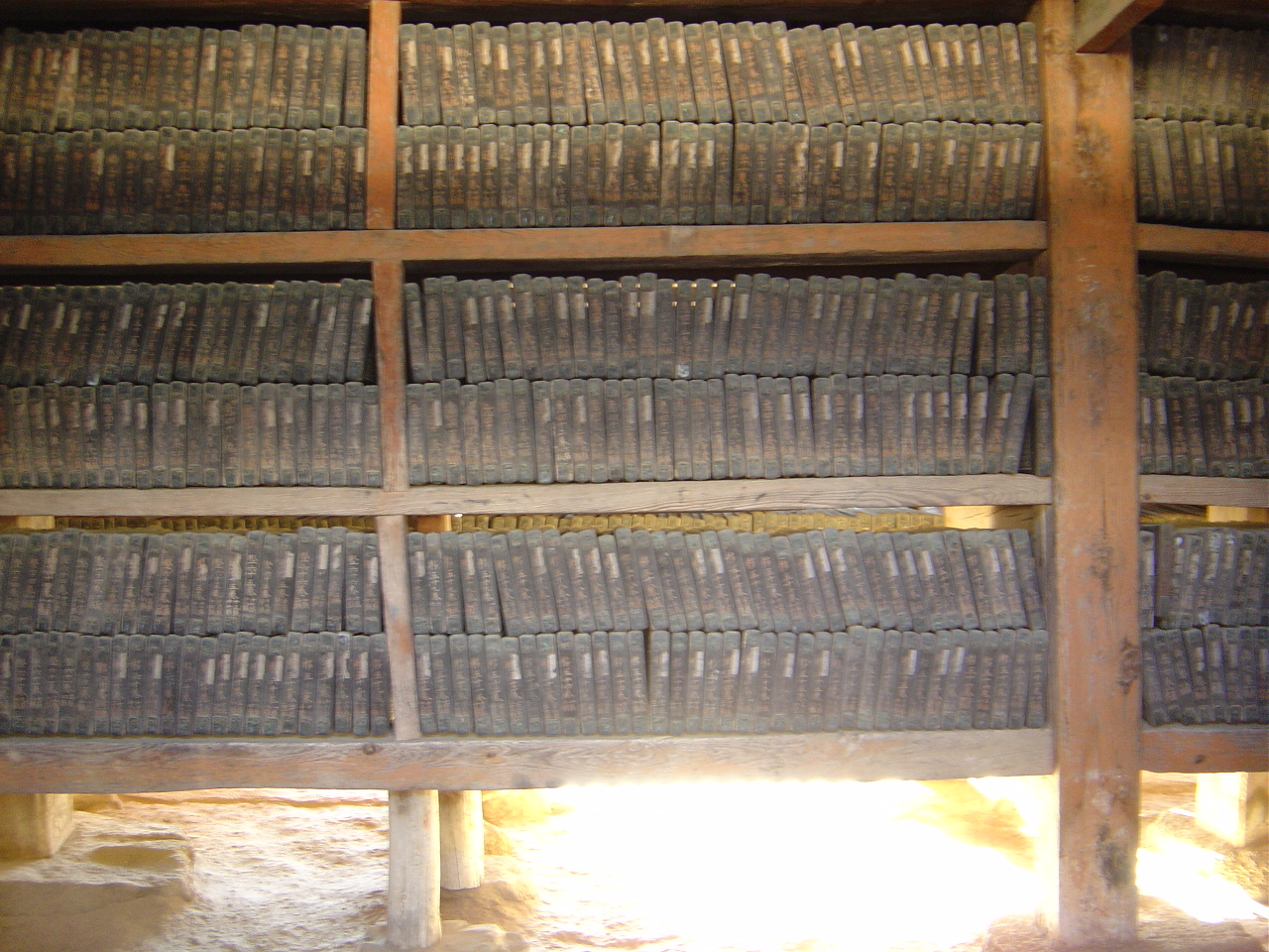 The Tripitaka Koreana at Haeinsa. Photograph taken by Saradevil.